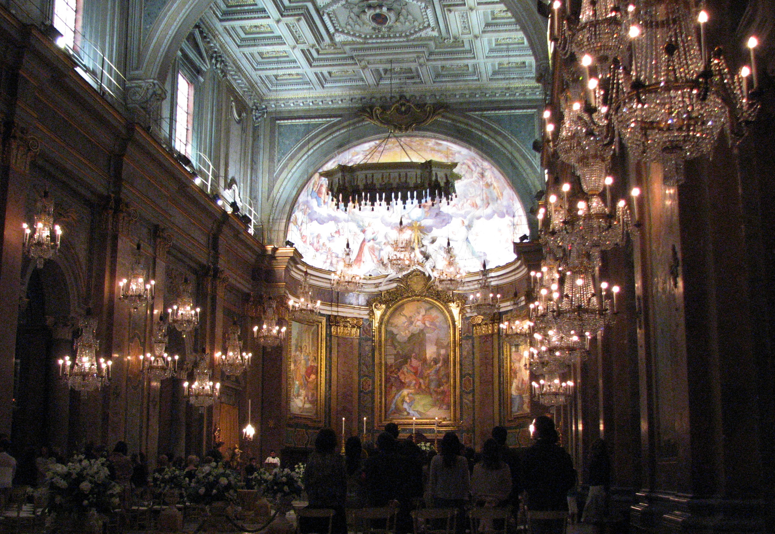 SS. Giovanni e Paolo - Roma, Italia